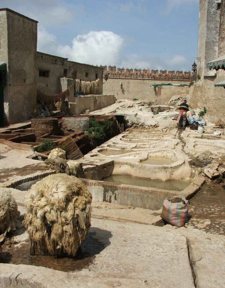 Tenería en la Medina de Tetuán